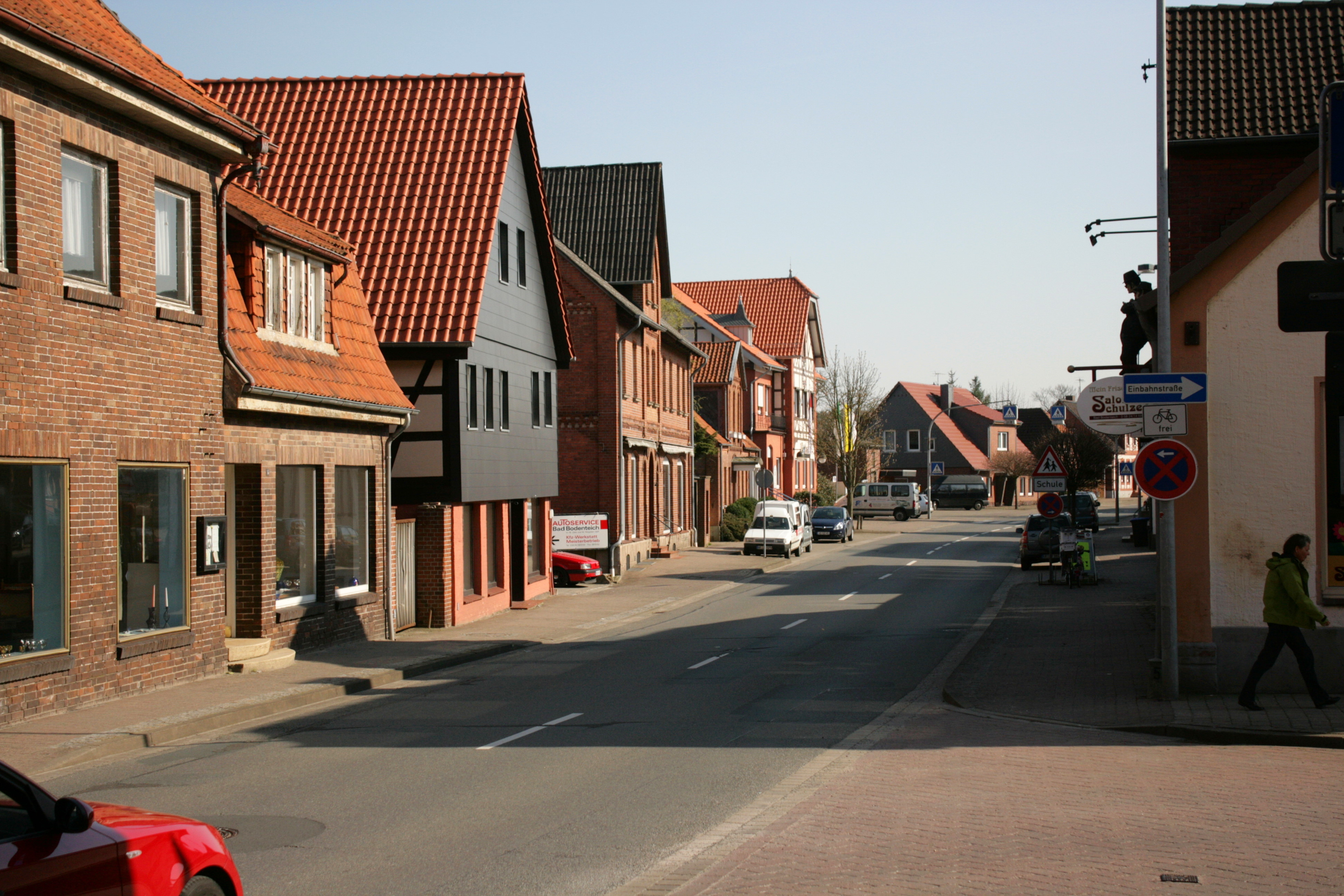 Hauptstraße in Bad Bodenteich